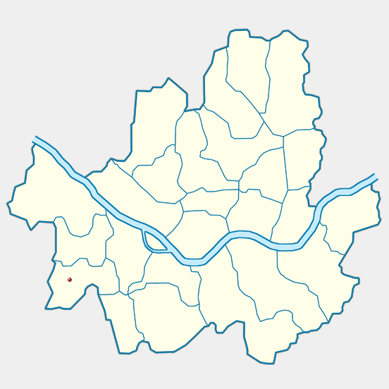 Guro-gu SEOUL